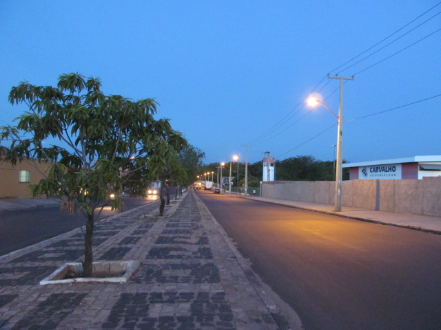 Uma das principais avenidas do bairro Mocambinho